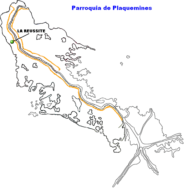 La Reussite, Plaquemines Parish, Louisiana.